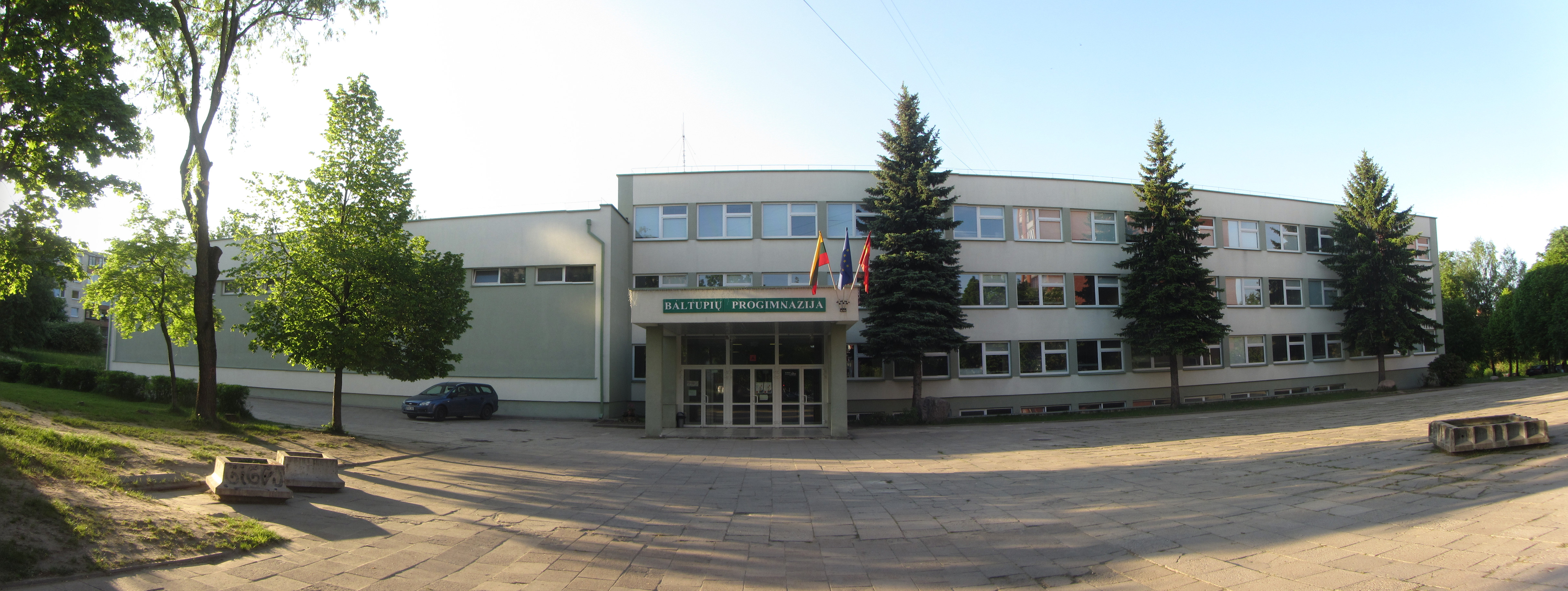 Baltupiai, Vilnius, Lithuania